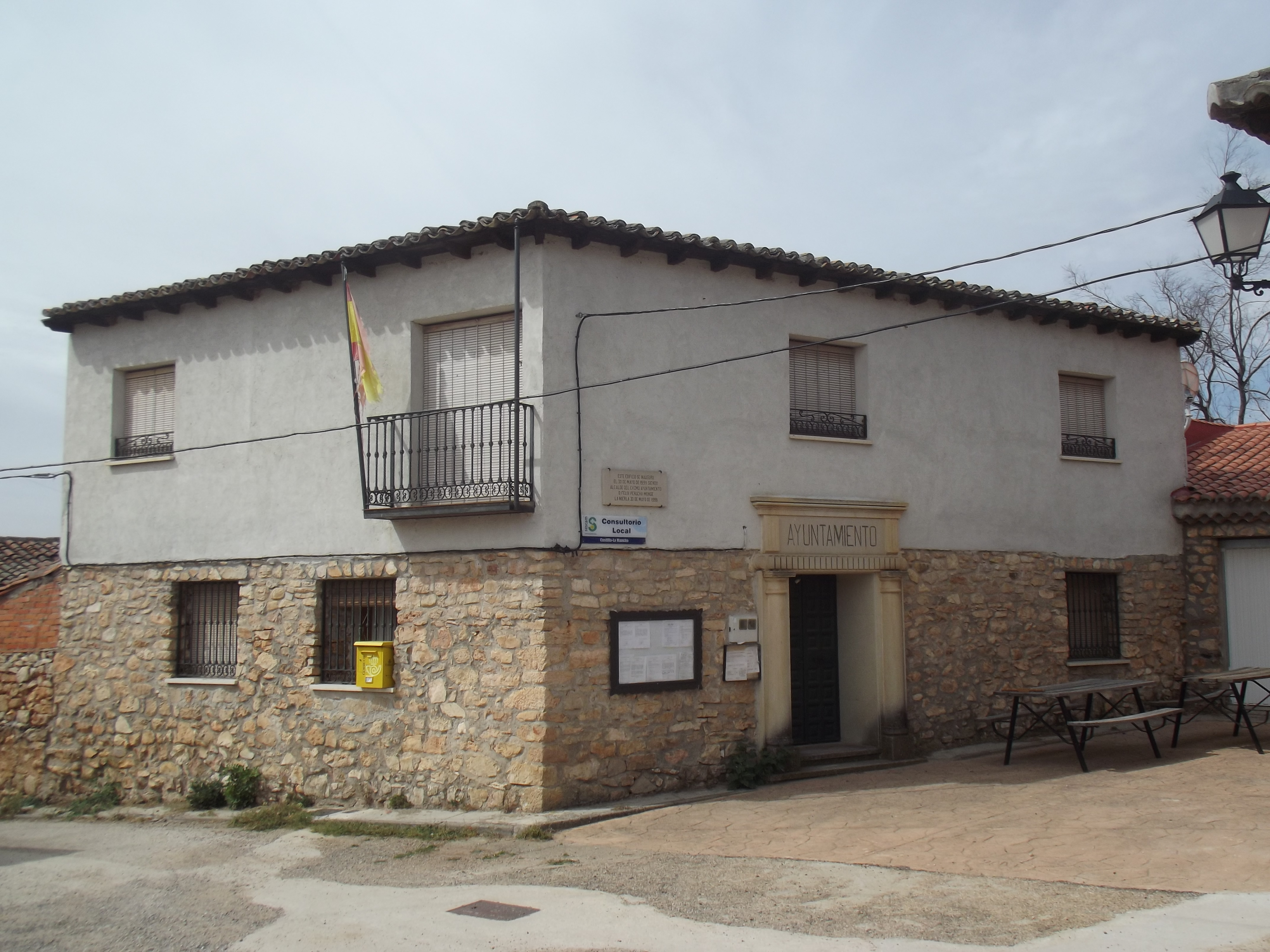 Ayuntamiento de La Mierla, provincia de Guadalajara.